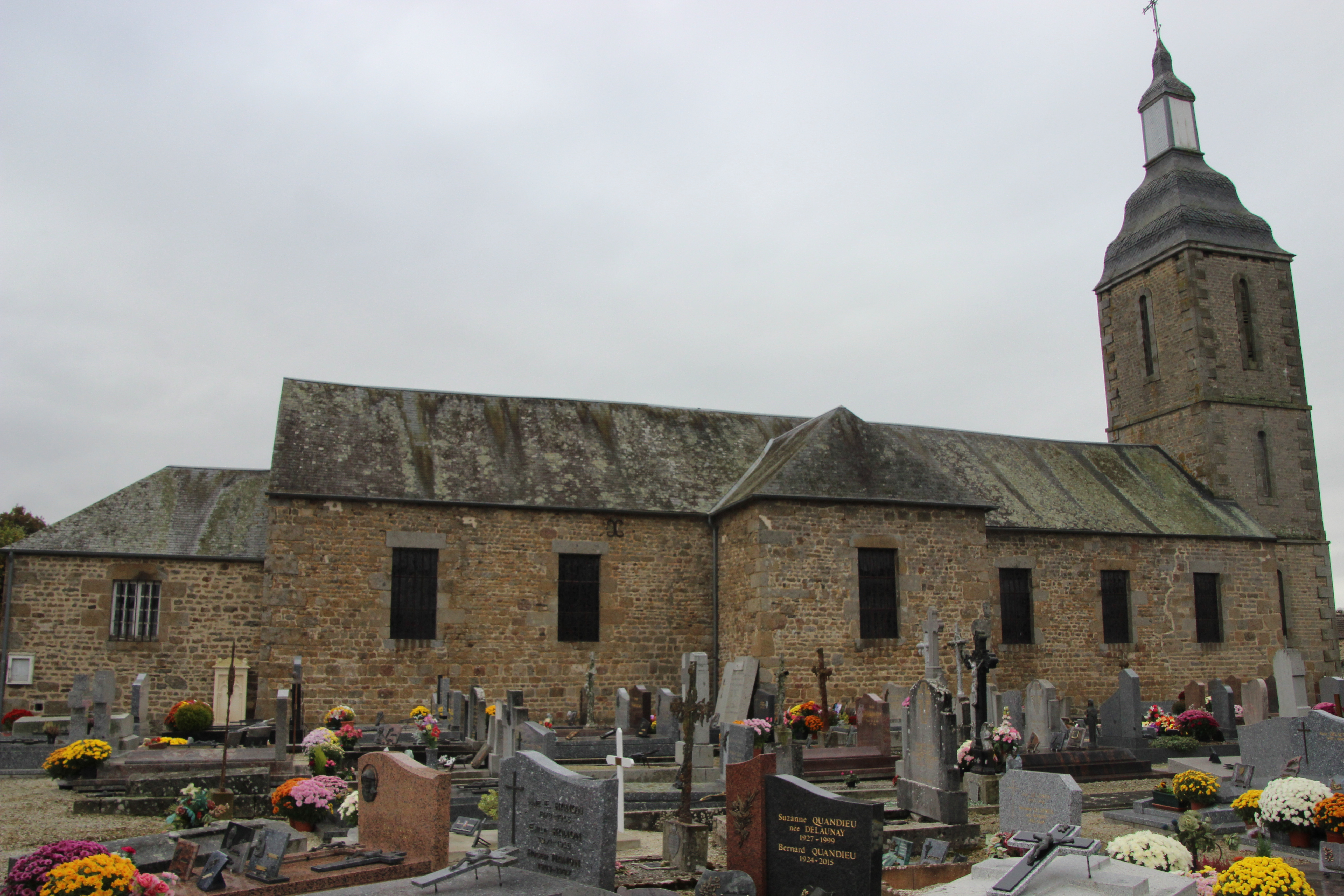 église de Pointel